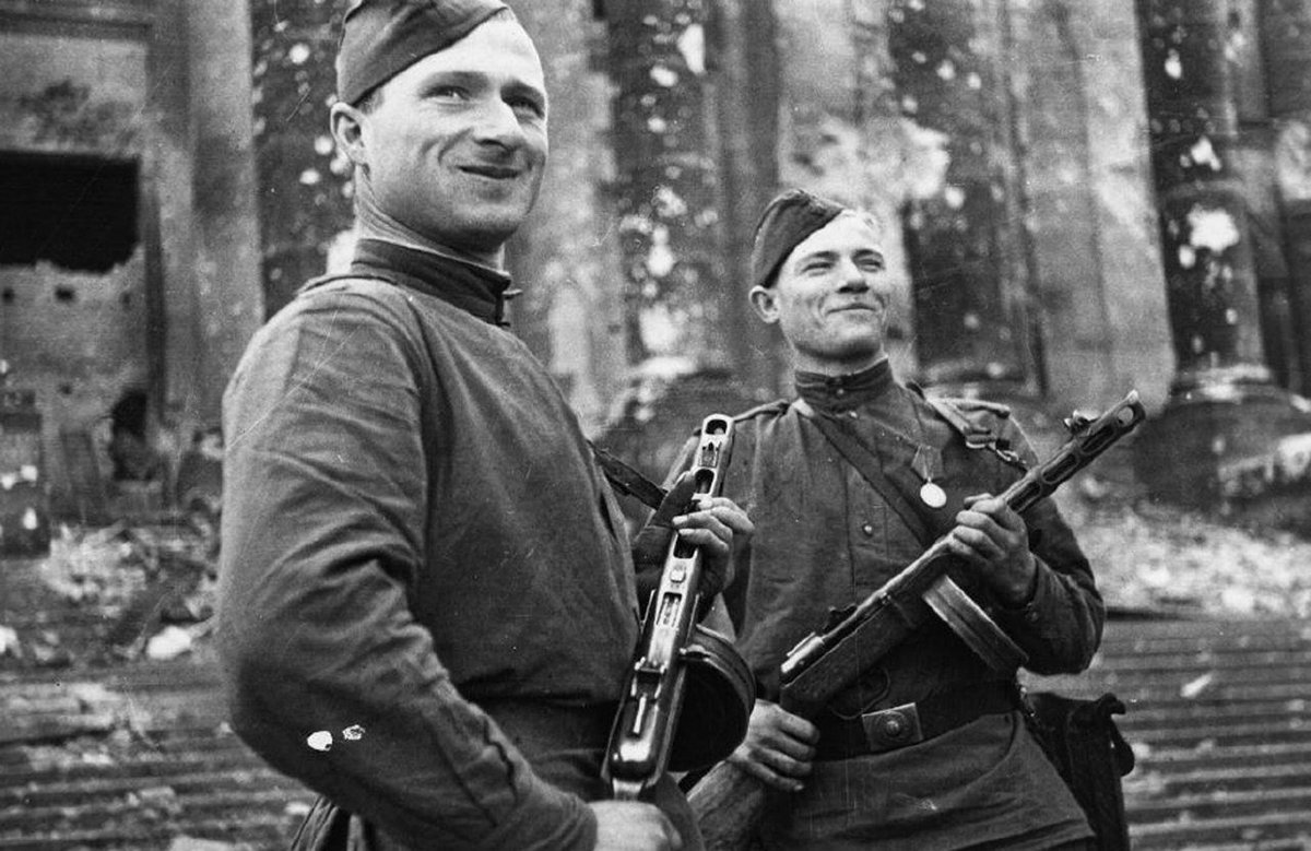 I sergenti Meliton Kantaria e Mikhail Egorov; issarono per primi la bandiera della Vittoria sovietica sul tetto del Palazzo del Reichstag a Berlino